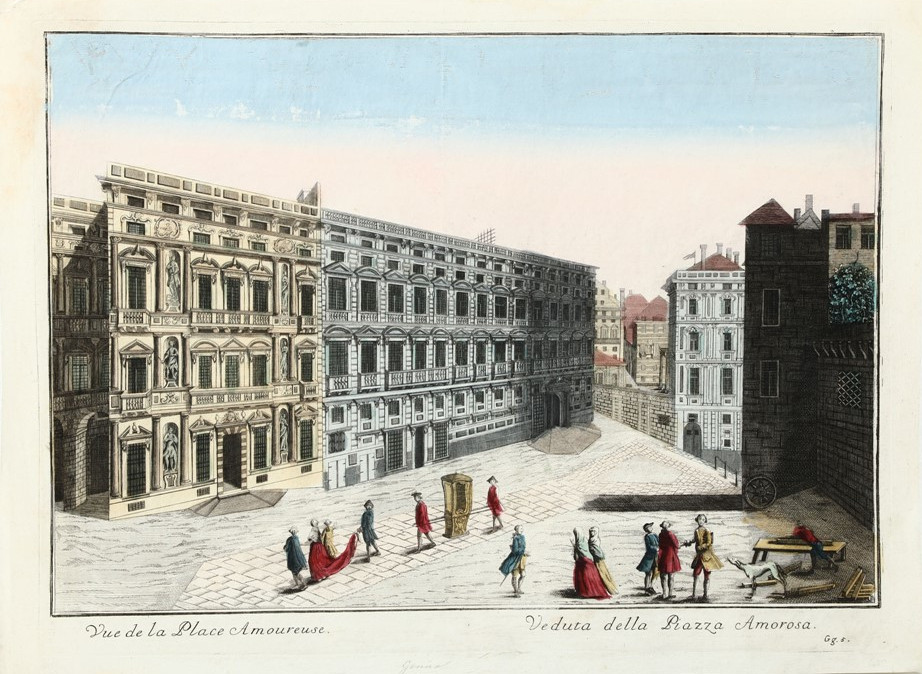 Veduta della piazza Amorosa. Genova. Vedute ottiche a colori. Francia (Parigi?) secolo XVIII